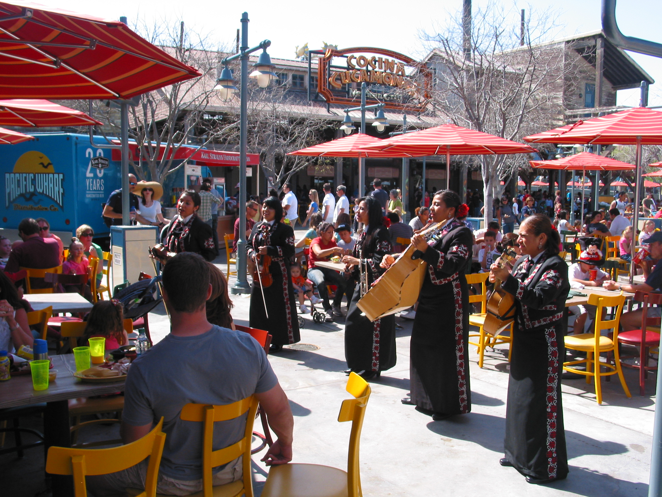 Anaheim Resort, Anaheim, CA, USA